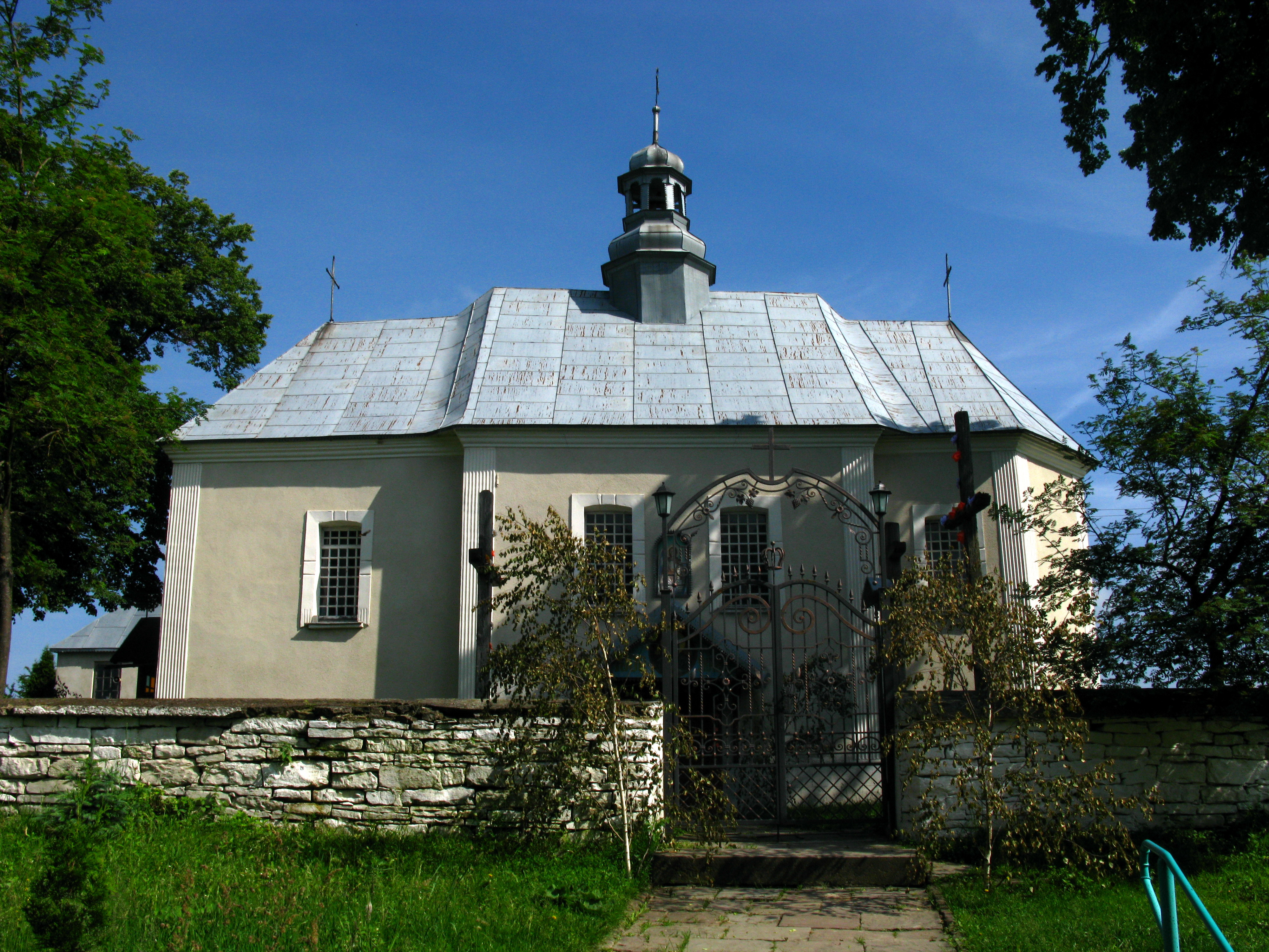 Церква Архістратига Михаїла (мур., колишній костел Святої Трійці), Долина